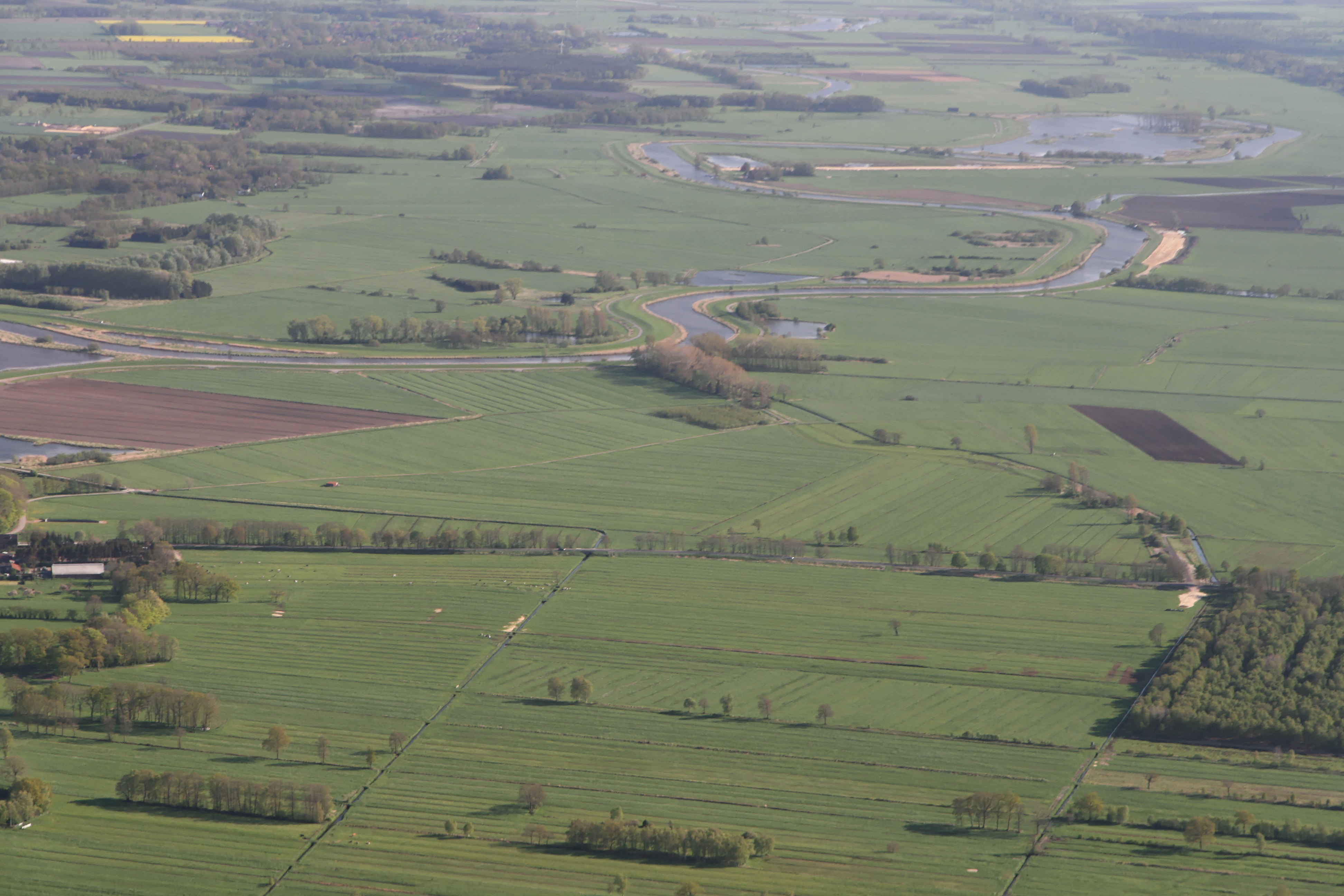 Luftaufnahme: Oste zwischen dem Landkreis Cuxhaven (unten) und dem Landkreis Stade (oben), in der oberen Bildhälfte das Naturschutzgebiet „Wiesen- und Weidenflächen an der Oste“ in Kranenburg